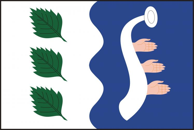 vlajka, Lhota u Lysic, okres Blansko